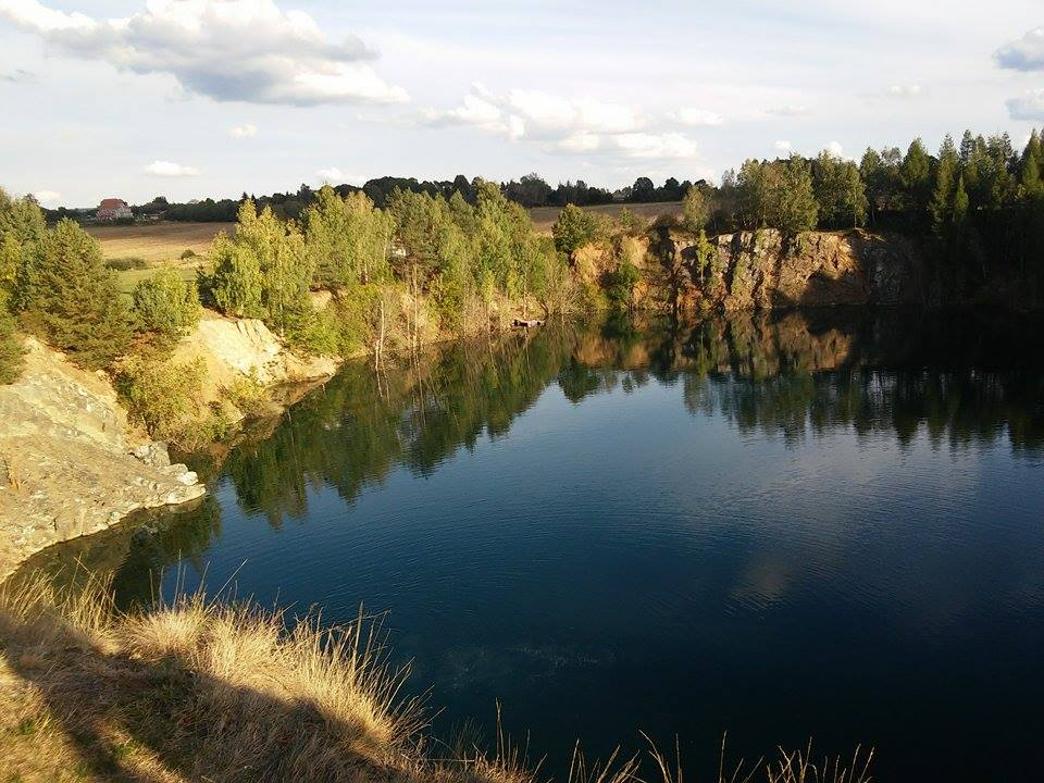 Lom na Borku